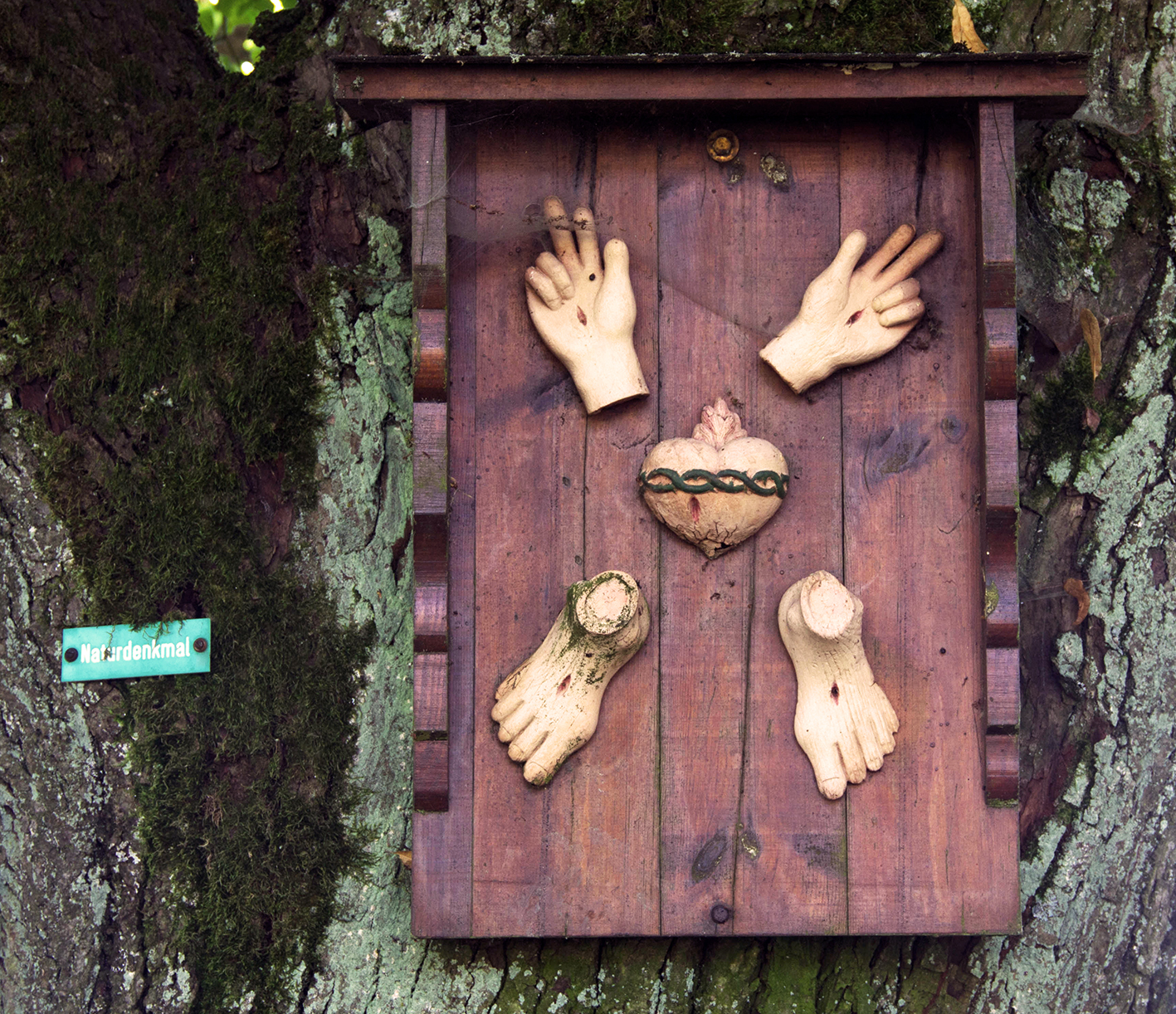 Fünfwundentafel an einer Linde unmittelbar rechts (westlich) neben der Sebastian-Kapelle zu Kupferberg